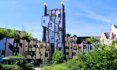 Wohnen unterm Regenturm